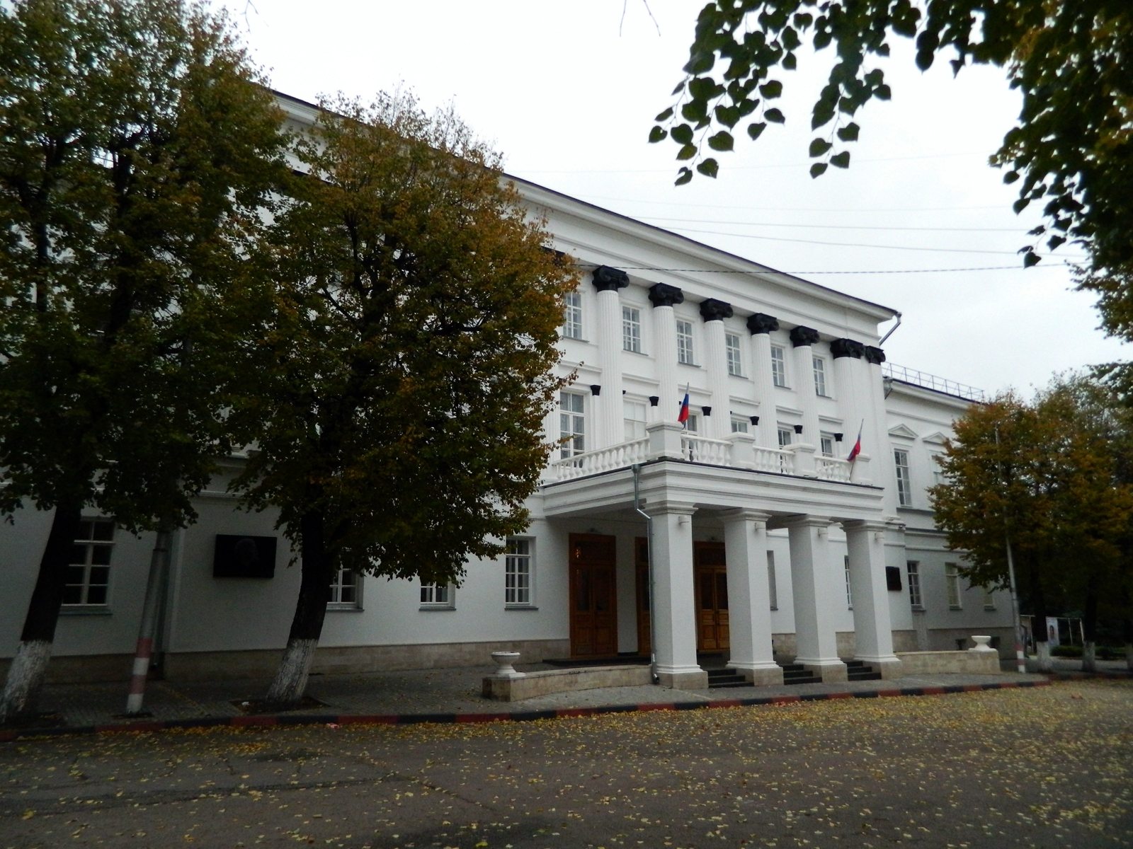 Дворянское собрание (Ульяновск)